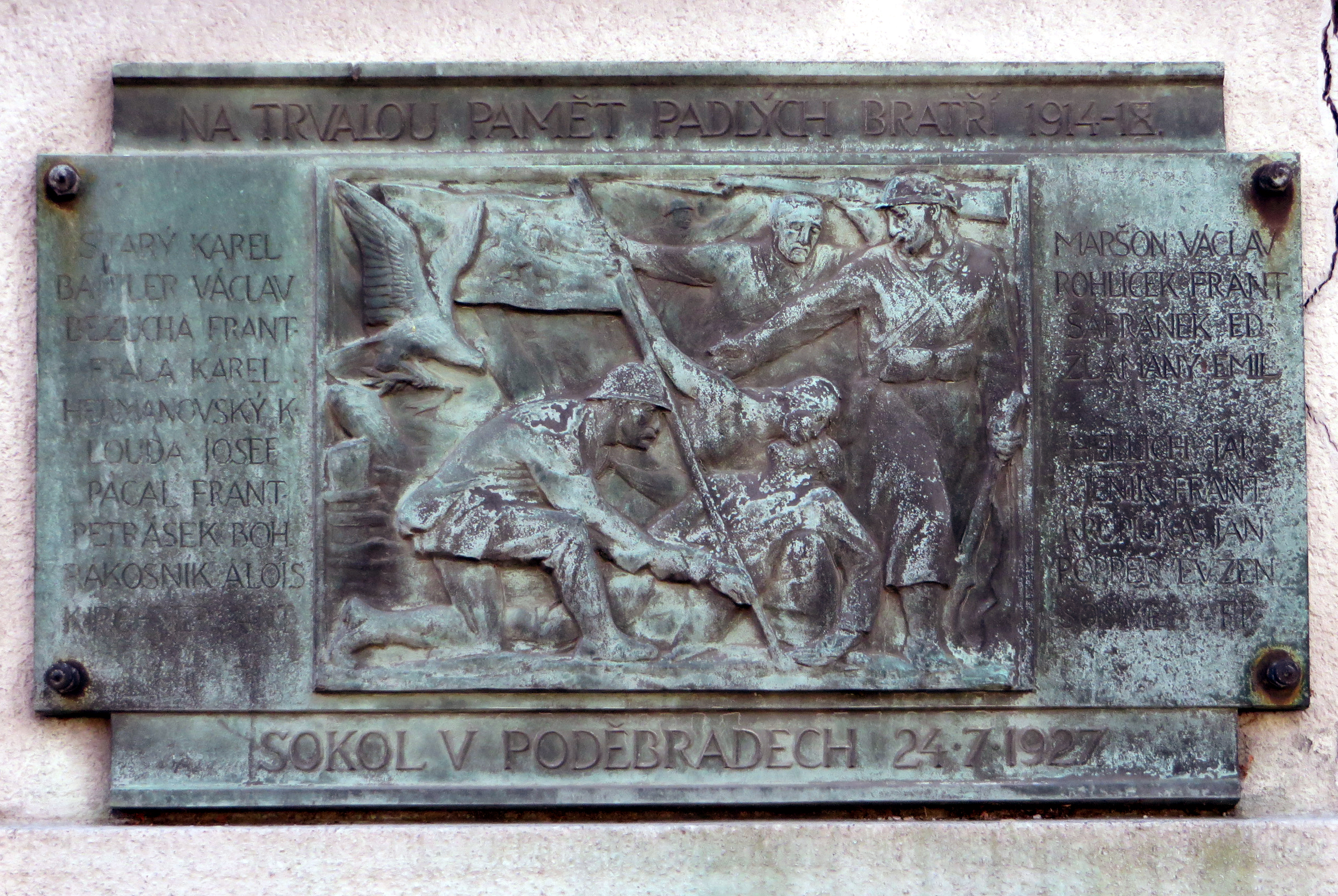 Pamětní deska na připomínku padlích členů Sokola, Tyršova 26/9. GPS: 50.1458292N, 15.1248847E